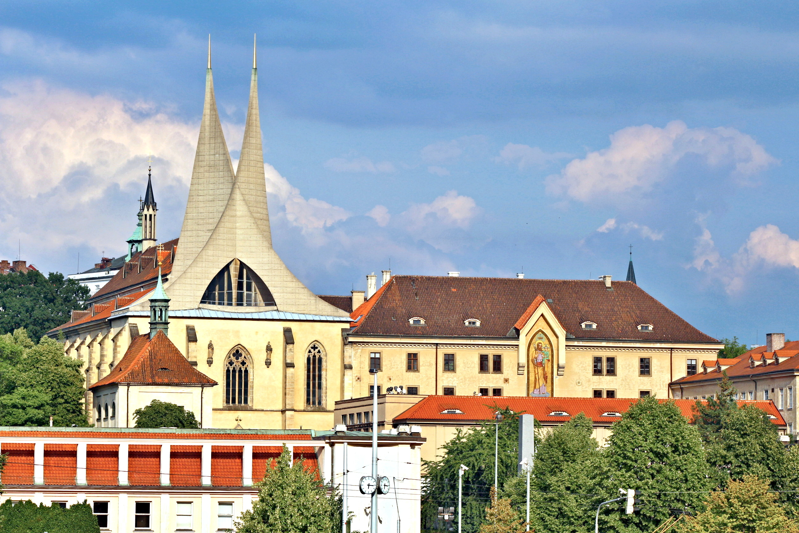 Emauzský klášter